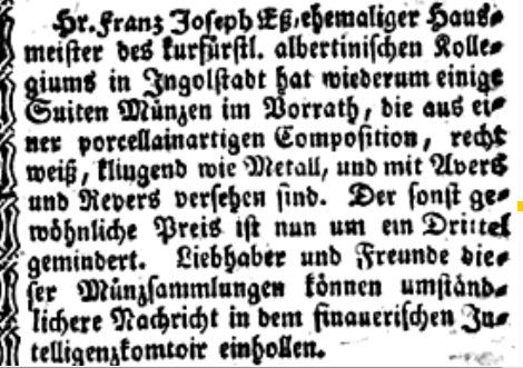 Annonce